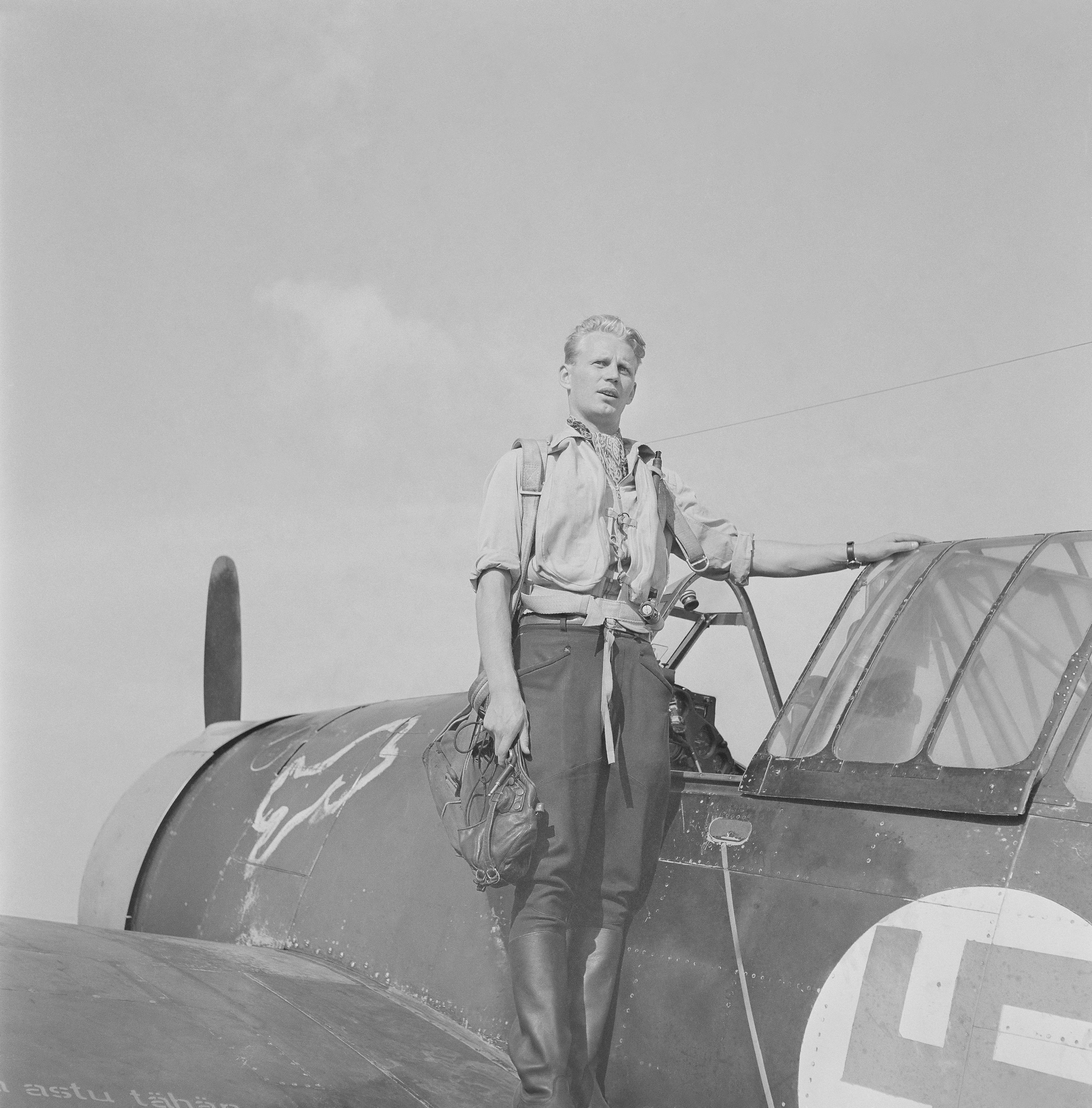 Luutnantti Hans Wind, Mannerheim-ristin ritari, joka on ampunut alas 39 ryssän konetta. (Wind seisoo Brewster B.239 -hävittäjän siivellä)